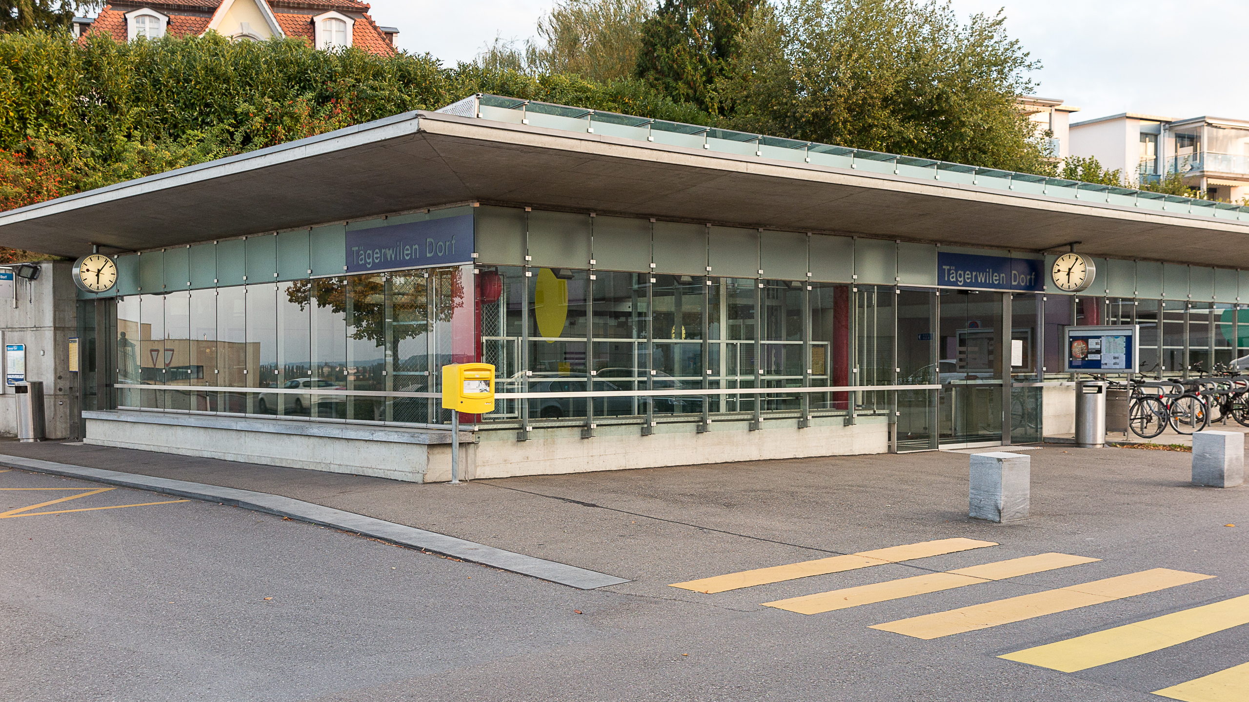 Bahnhof Tägerwilen-Dorf